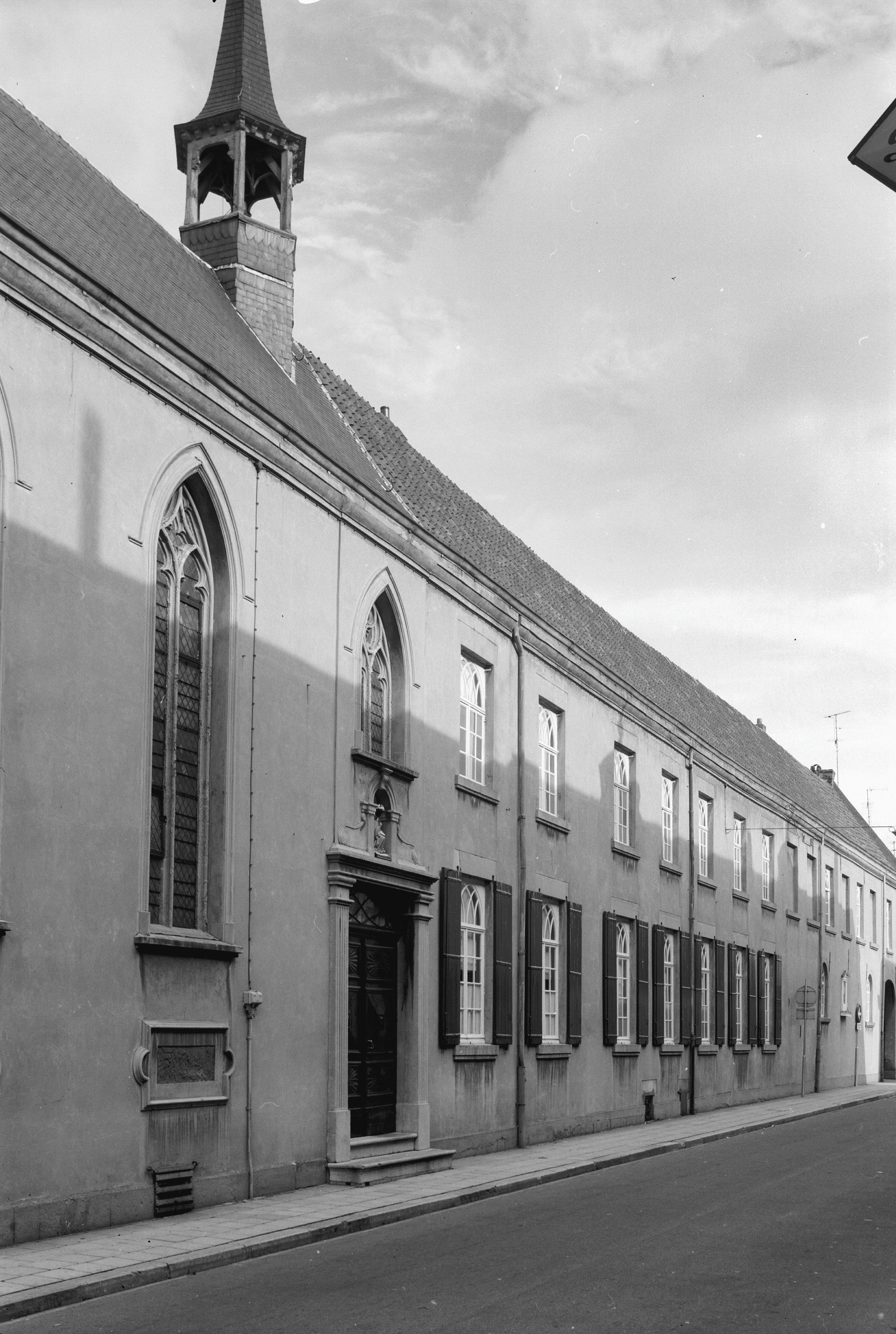 Birgittenessenklooster: Maasstraat 17, gevel